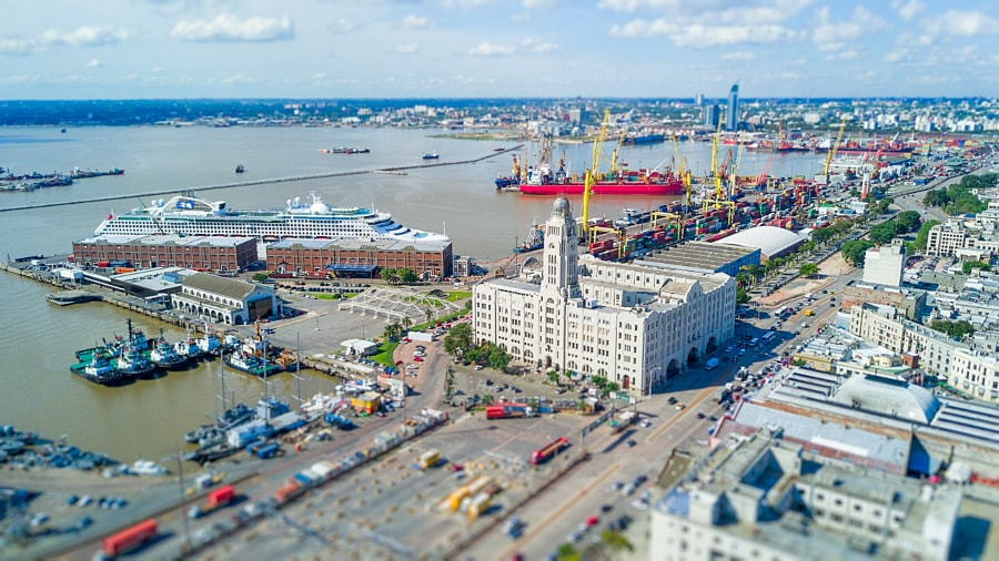 Вид на монтевидеоский порт